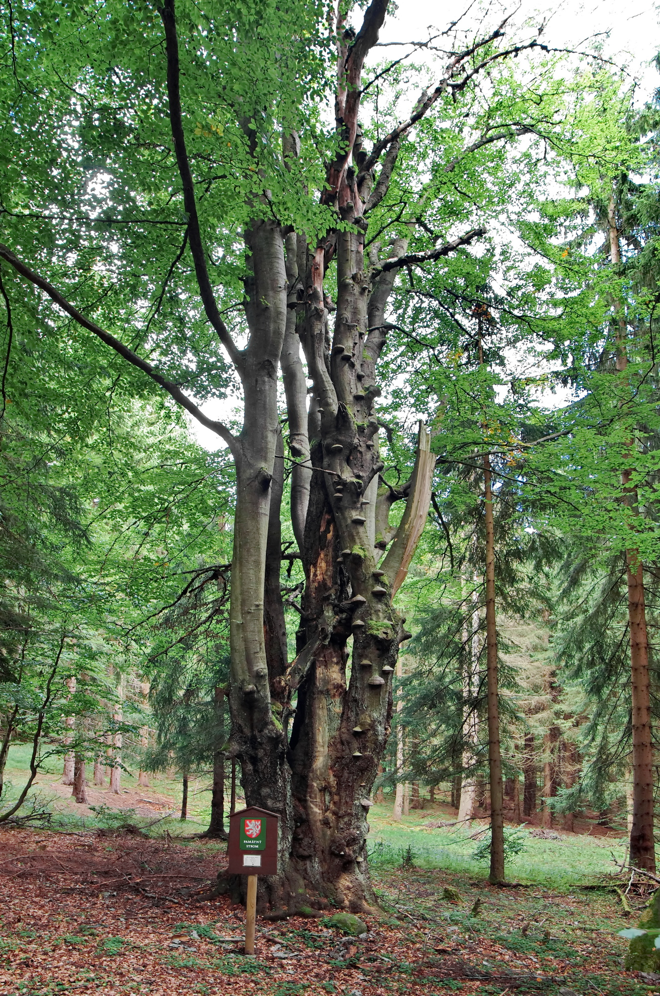 Památný strom Buk na Starém Jelení, Krušné hory, okres Karlovy Vary